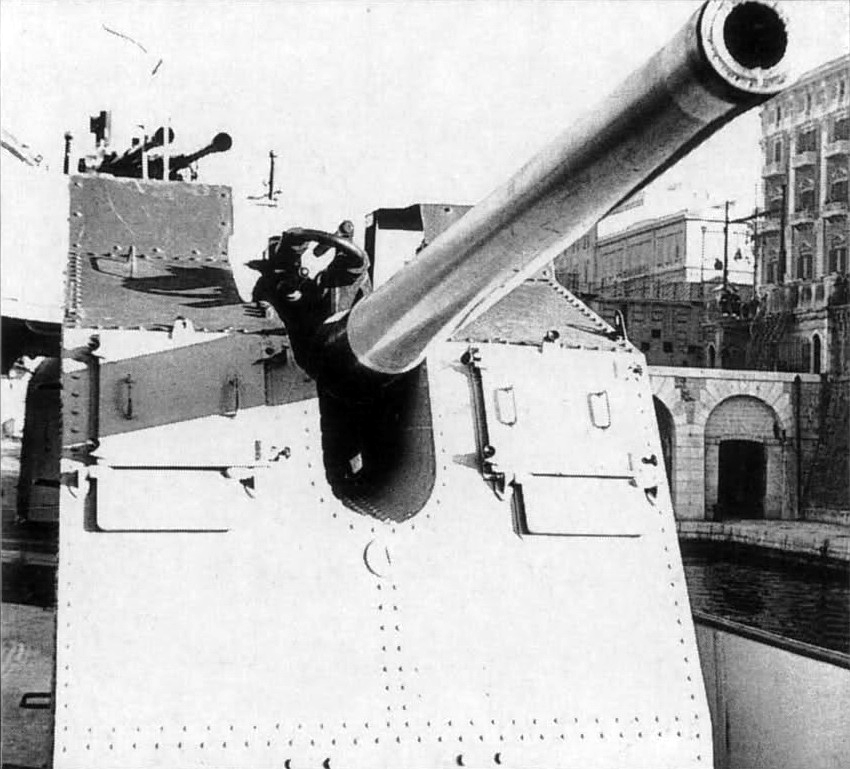 Cannone per il tito illuminante da 100/47 dell'incrociatore Garibaldi in transito nel canale navigabile di Taranto